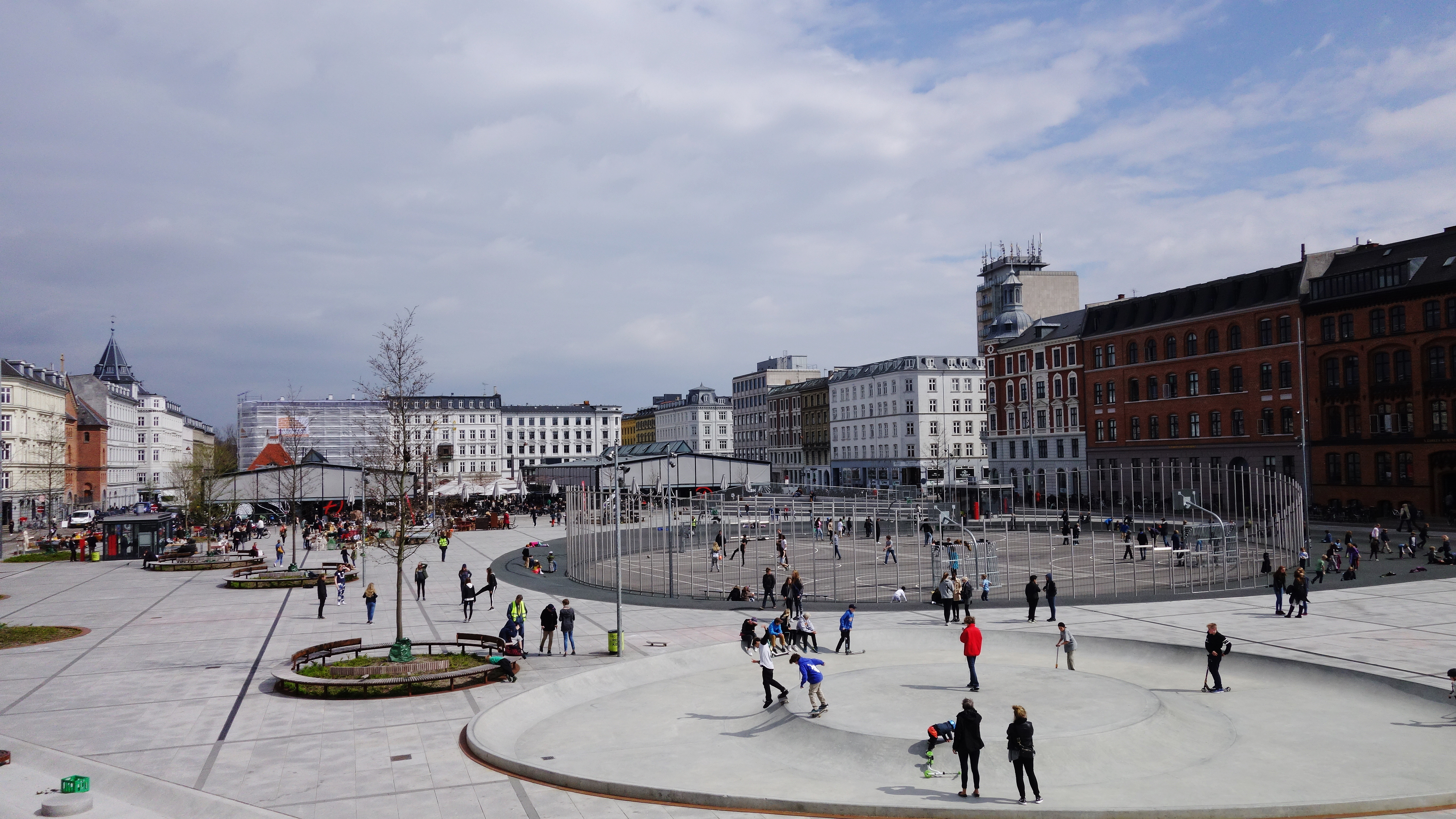 Israels Plads - Copenhagen